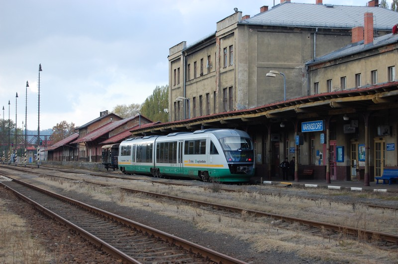 motorová jednotka Siemens Desiro společnosti Vogtlandbahn na trati Trilex